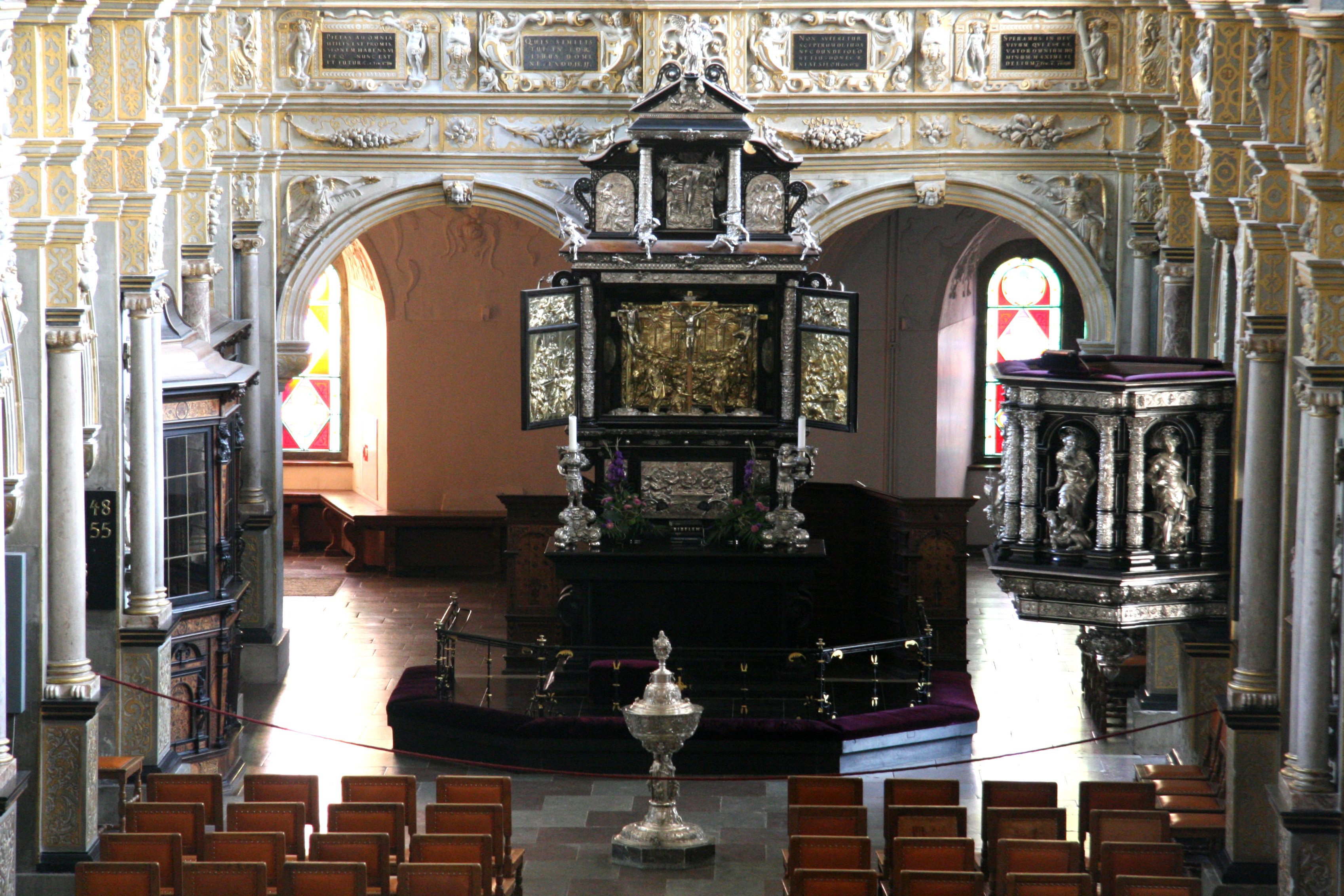 Frederiksborg Slotkirke, Hillerød, Denmark. Quire